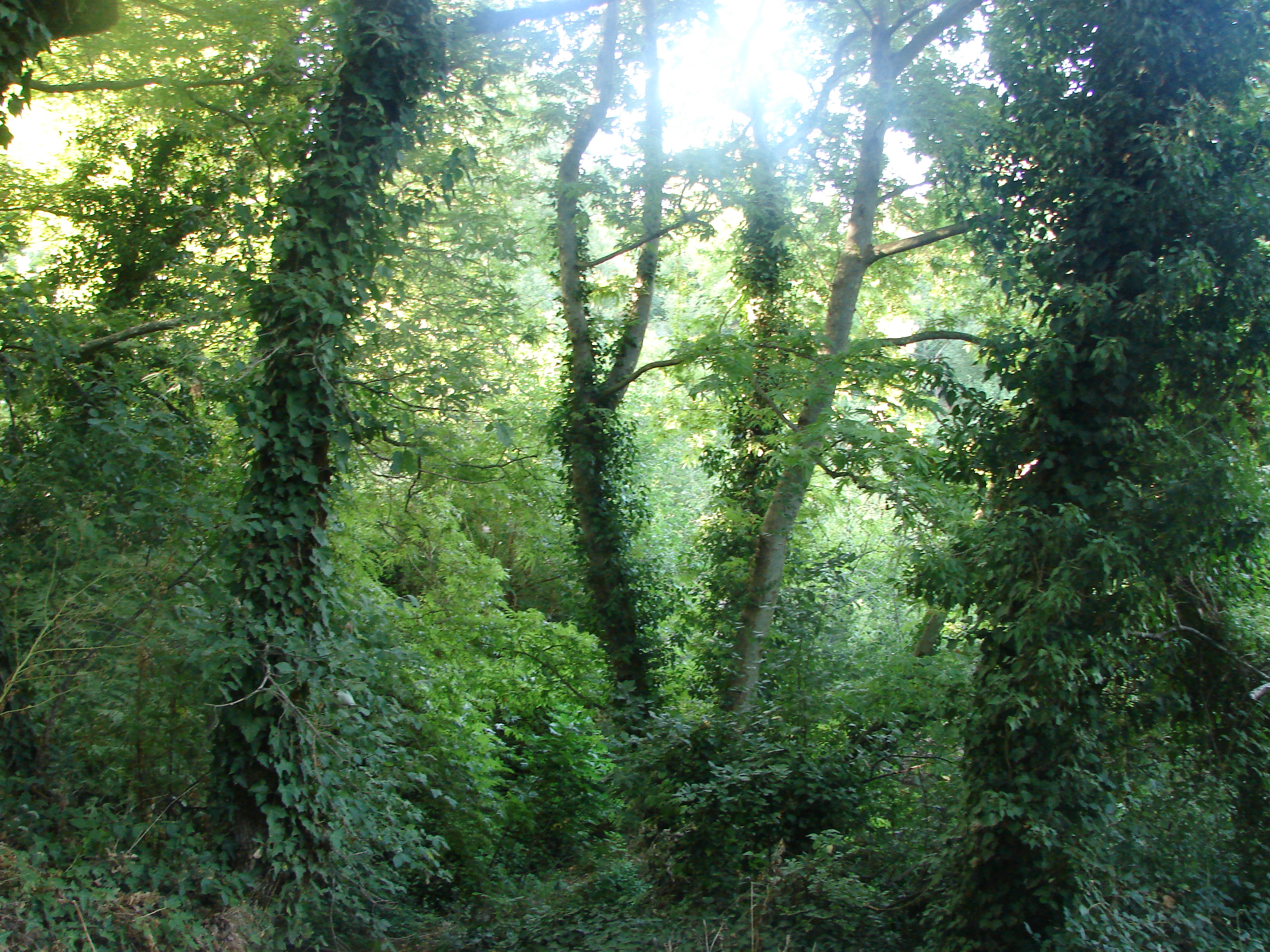 صورة داخل إحدى غابات البطار